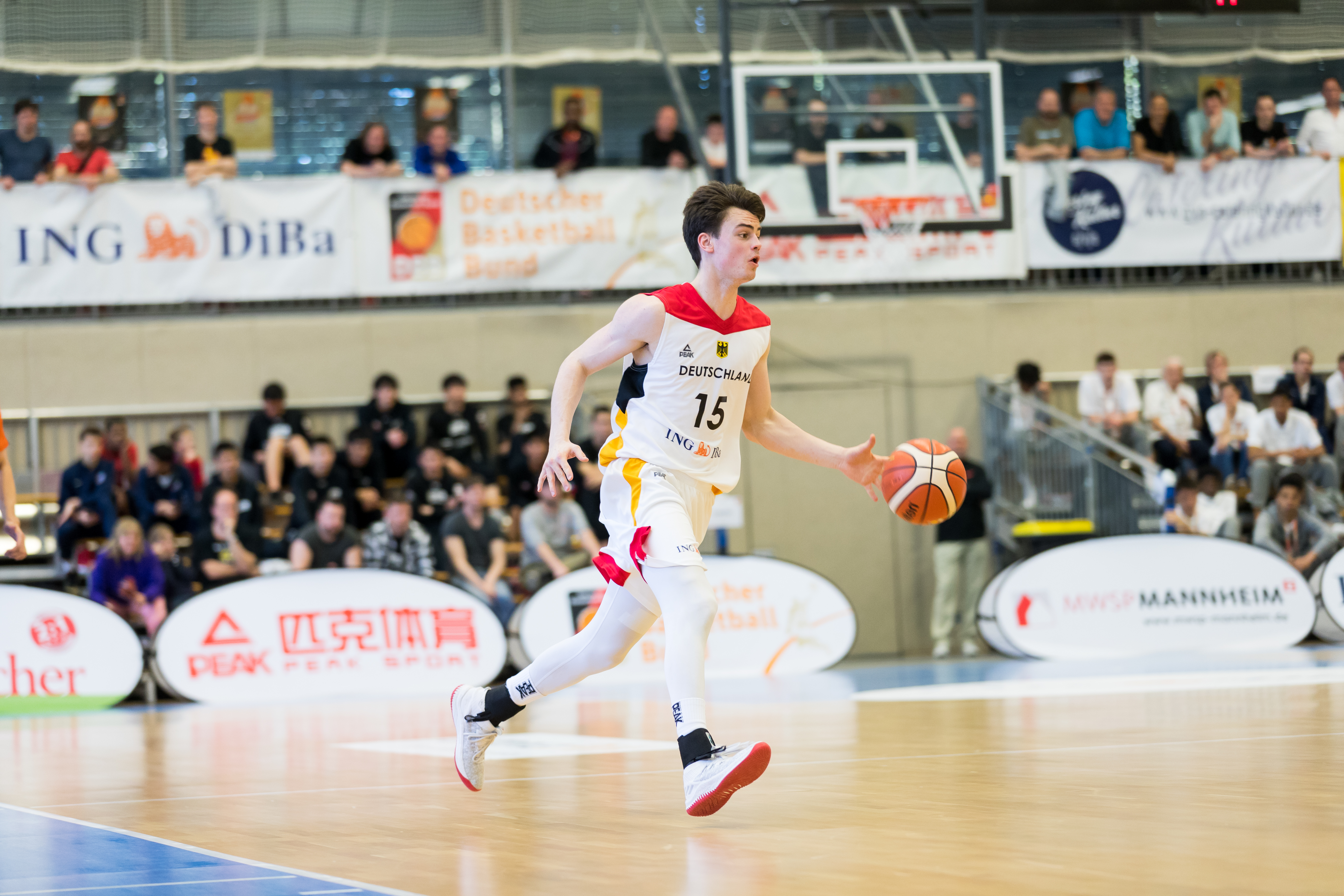 Australia vs Germany 66:88 during final Basketball Albert Schweitzer Turnier at GBG Halle, Mannheim, Baden-Württemberg, Germany on 2018-04-07, Photo: Sven Mandel